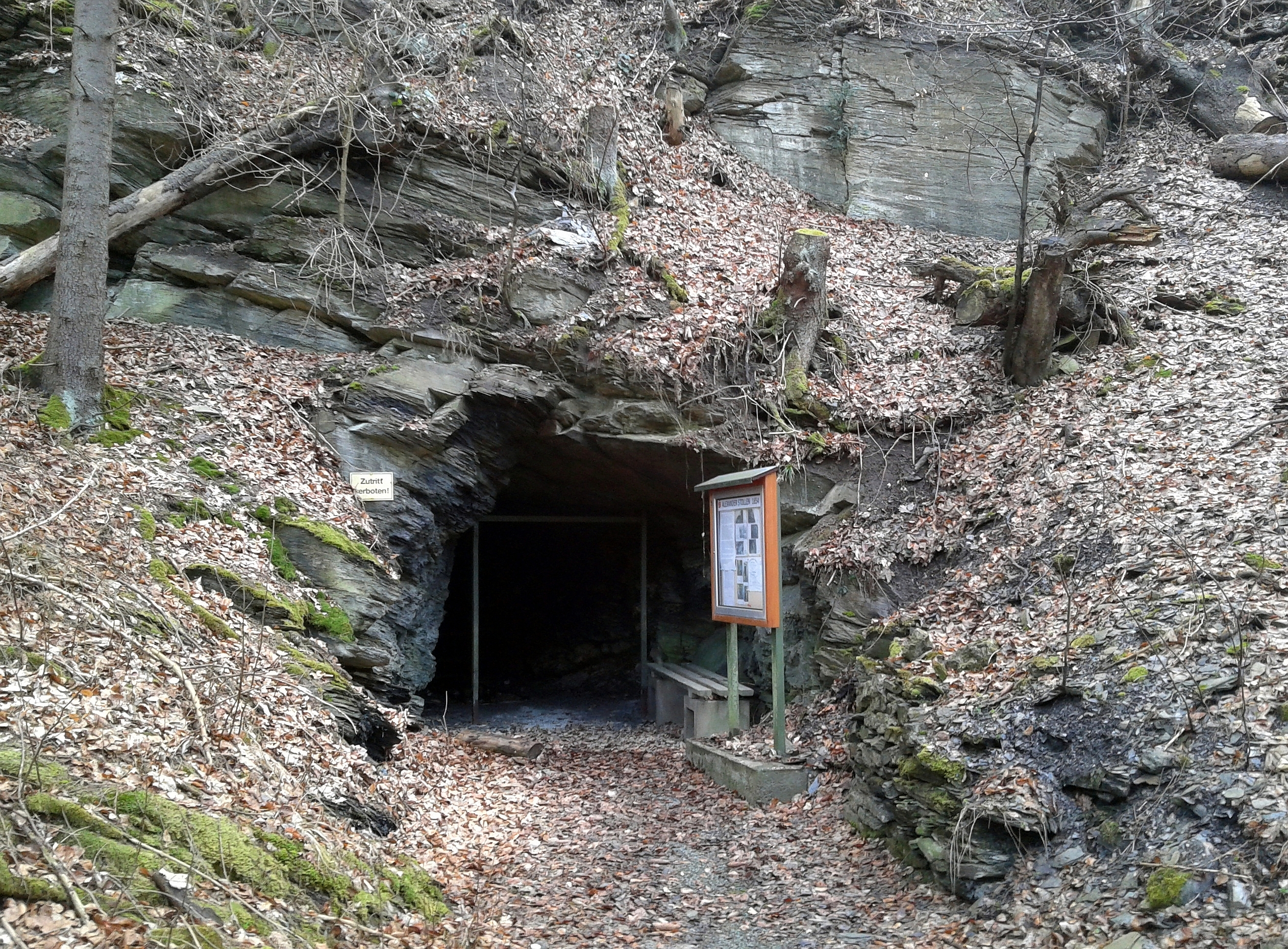 Alexanderstollen, Bestwig-Ostwig (Germany)